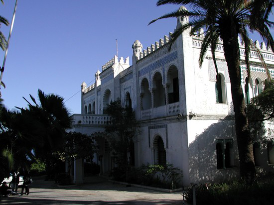 Villa Susini à Alger